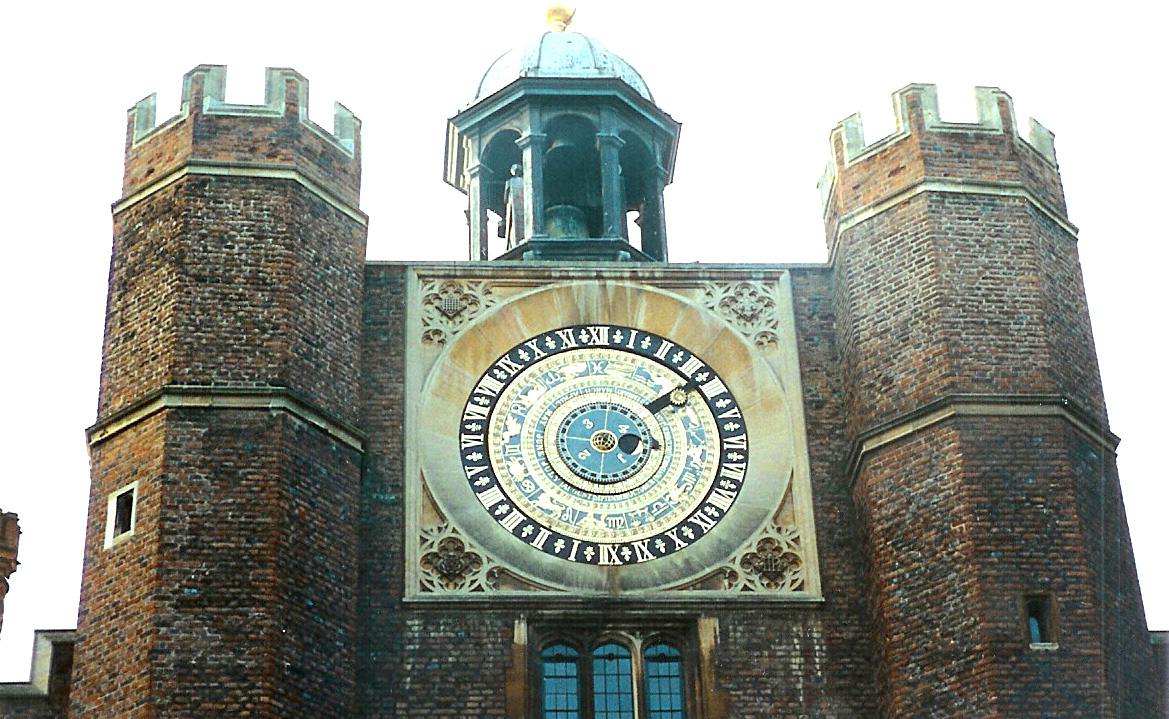 Schlass vun Hampton Court2